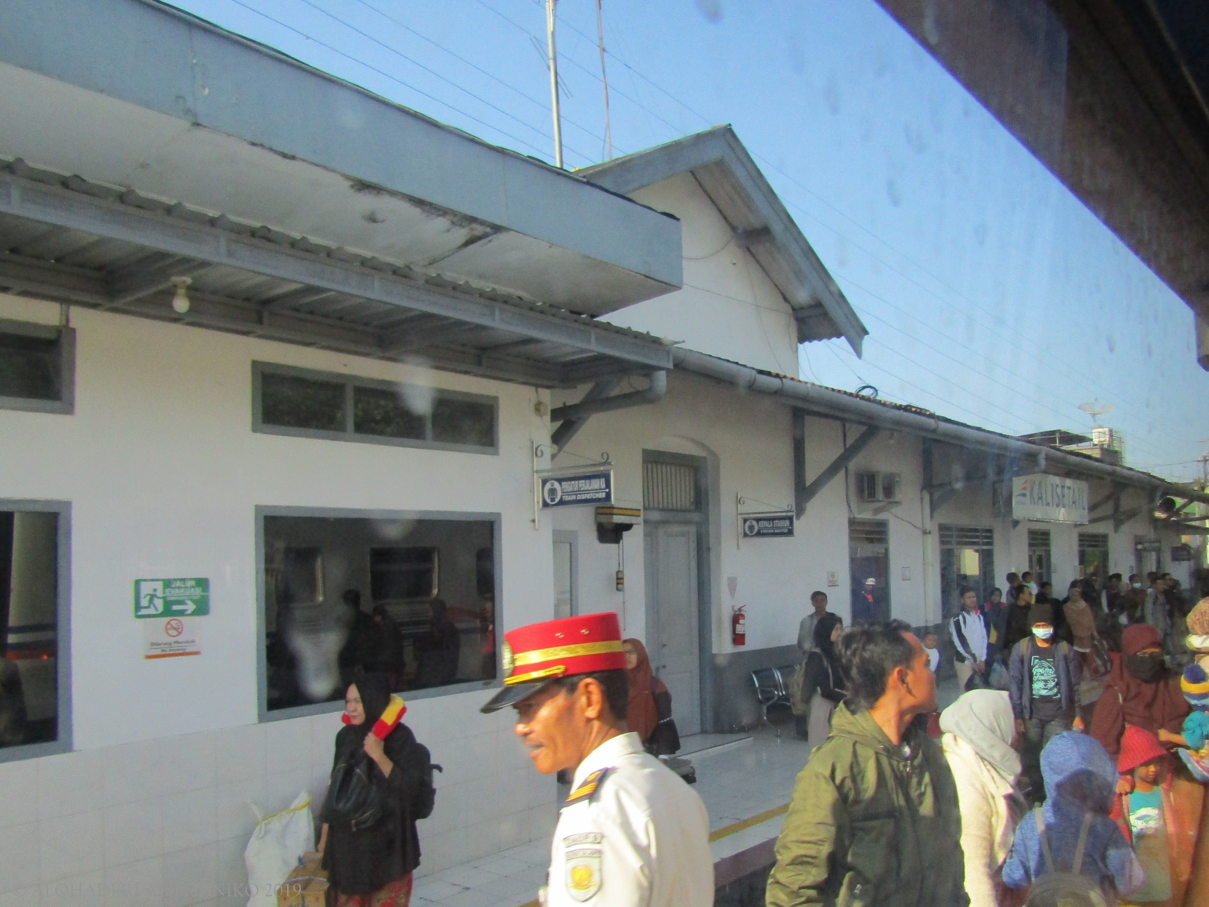 Stasiun Kalisetail, dilihat dari peron